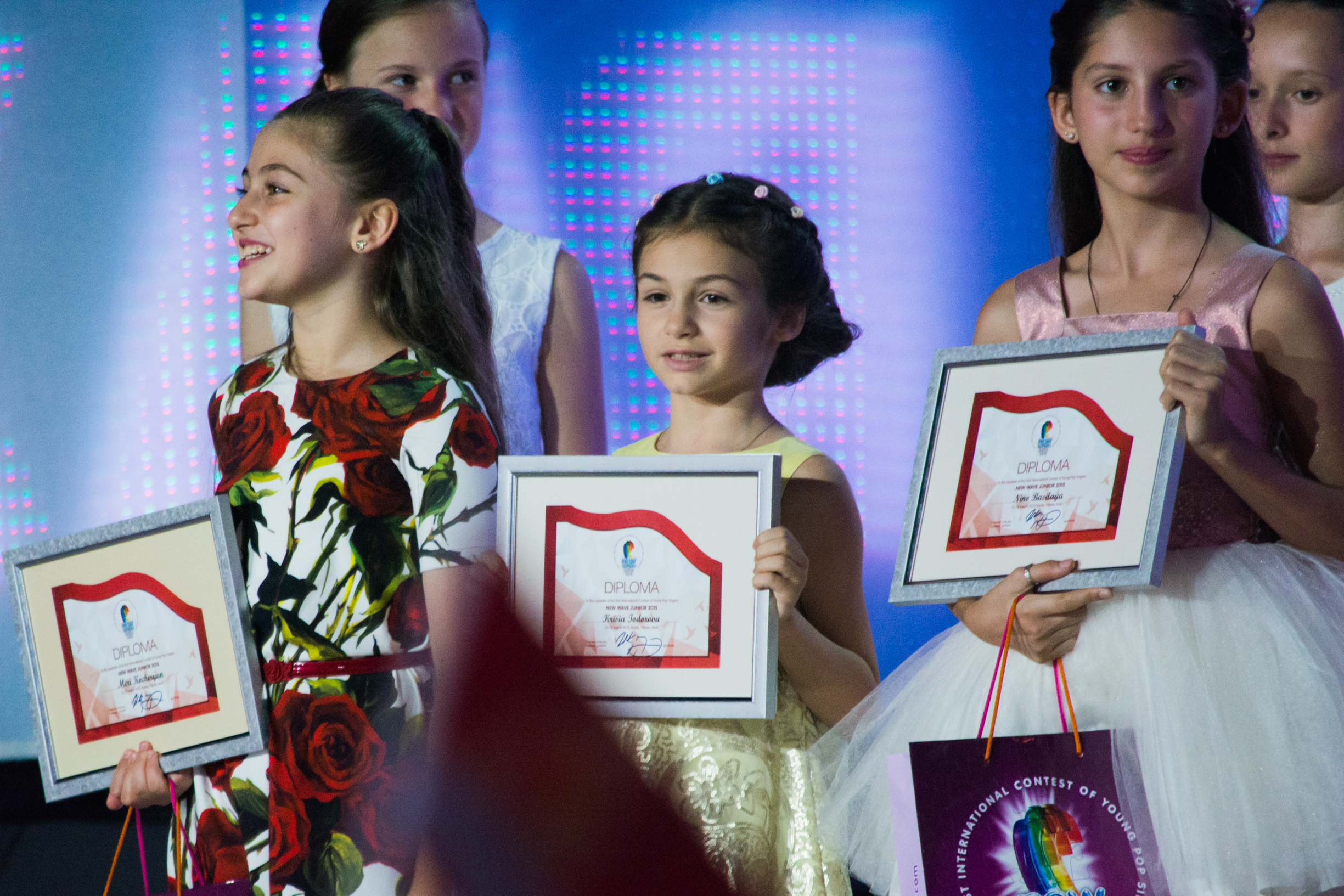 Крисия Тодорова на Детской Новой волне 2015